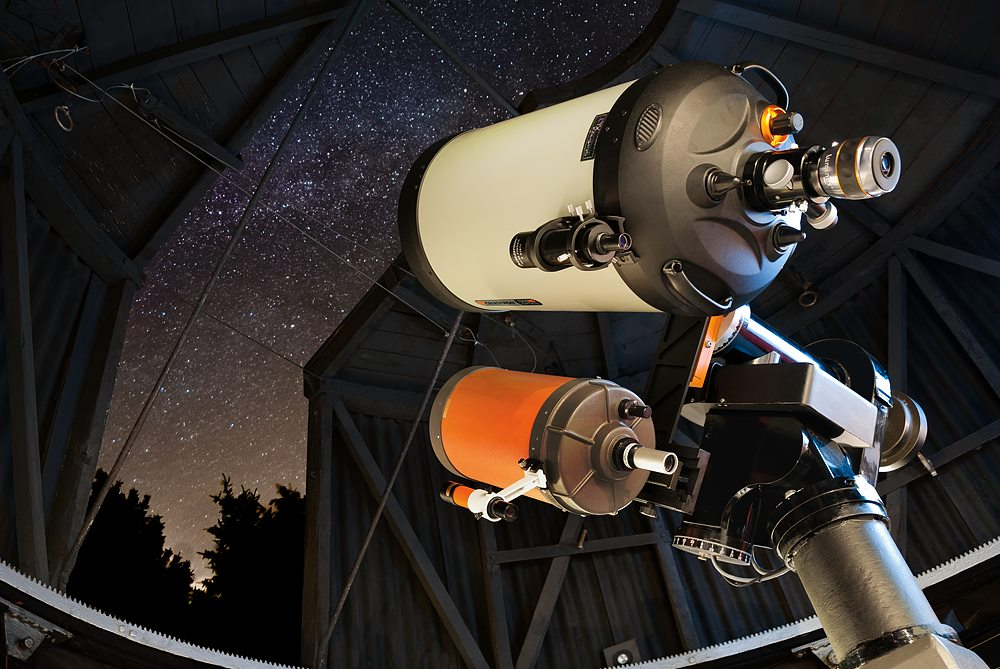 Das Celestron C14 EHD im Jahre 2015 auf der SIDERES Montierung in der Sternwarte Solingen. Als Leitfernrohr war damals ein C8 montiert.